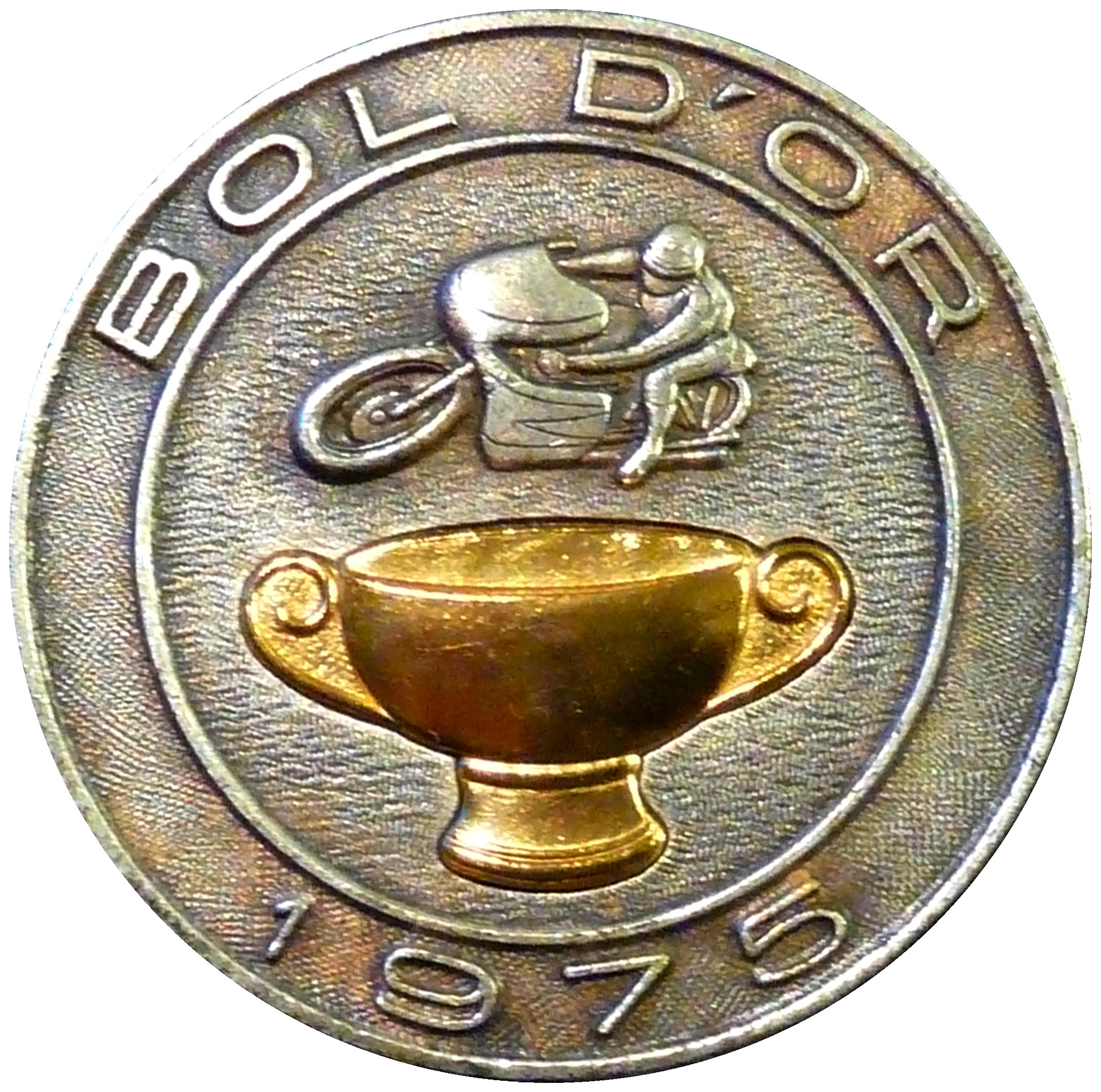 Insigne en métal (broche) du Bol d'Or 1975. Sans indication de fabricant ni d'auteur.